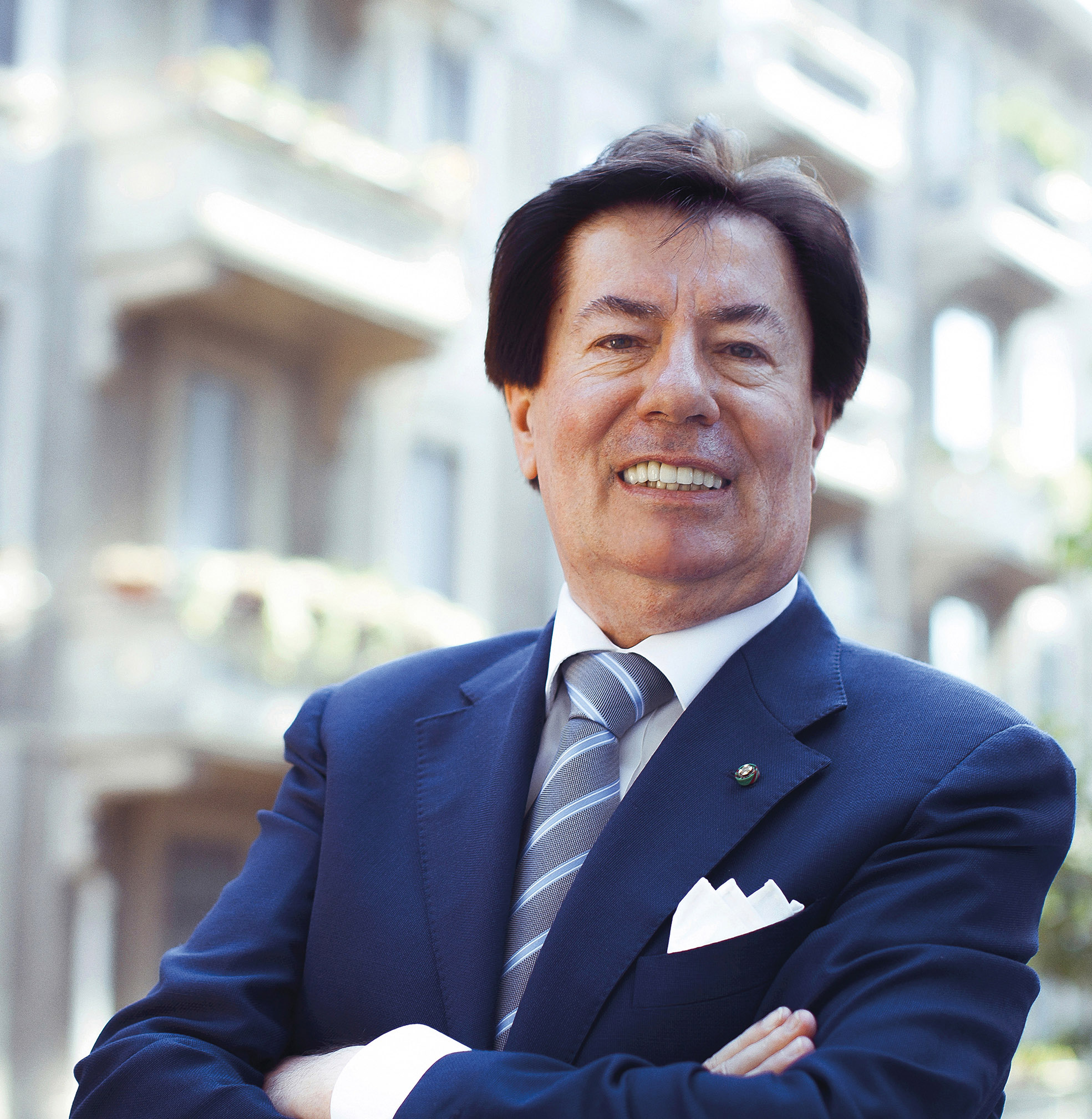 Luogo Milano